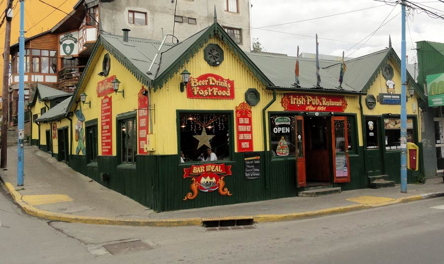 Ushuaia